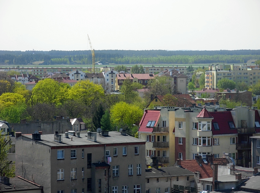 Widok z wieży ciśnień w Bydgoszczy w kierunku południowo-zachodnim (Górzyskowo)